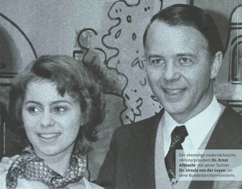 Der ehemalige niedersächsische Ministerpräsident Dr. Ernst Albrecht mit seiner Tochter Dr. Ursula von der Leyen, unserer Bundesfamilienministerin. Wir suchen Menschen, denen Politik nicht nur im Blut, sondern auch am Herzen liegt. Was ist die größte Triebfeder, um sich politisch zu engagieren? Wir denken es ist die Leidenschaft. Die Leidenschaft, neue Ideen durchzuboxen und für seine Überzeugungen zu streiten. Wieviel Leidenschaft steckt in Ihnen? Werden Sie Mitglied. Informationen unter Farbe bekennen. CDUAbbildung:JugendfotoPlakatart:Kandidaten-/Personenplakat mit PorträtKünstler_Grafiker:Foto: ullstein bild/C.T.FotostudioAuftraggeber:CDU-Bundesgeschäftsstelle, Marketing und Interne Kommunikation, BerlinObjekt-Signatur:10-031 : 60014Bestand:CDU-Plakate (10-031)GliederungBestand10-18:CDU-Plakate (10-031) » Mitgliederwerbeaktion 2007Lizenz:KAS/ACDP 10-031 : 60014 CC-BY-SA 3.0 DE